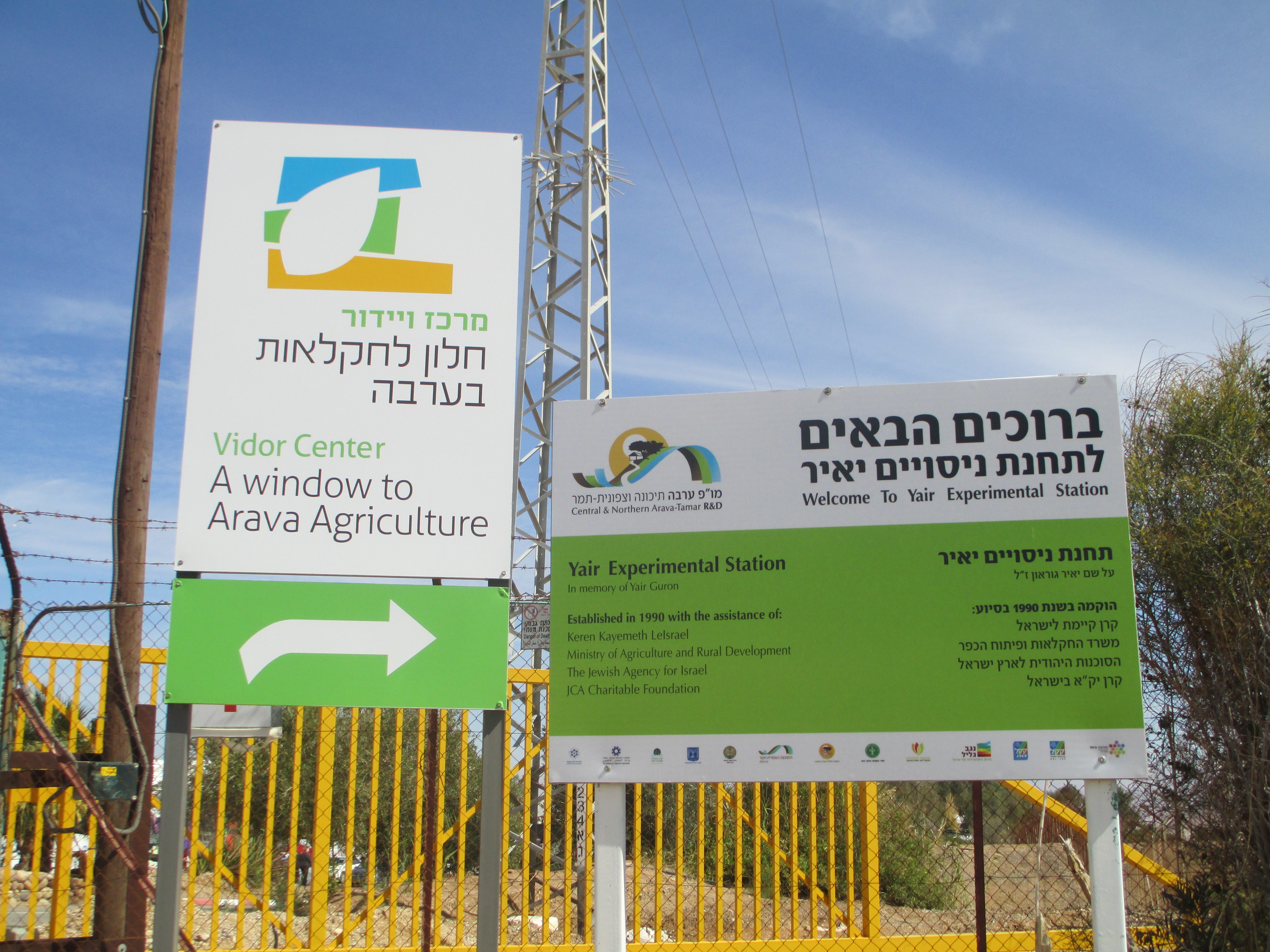 תחנת נסיונות יאיר בערבה